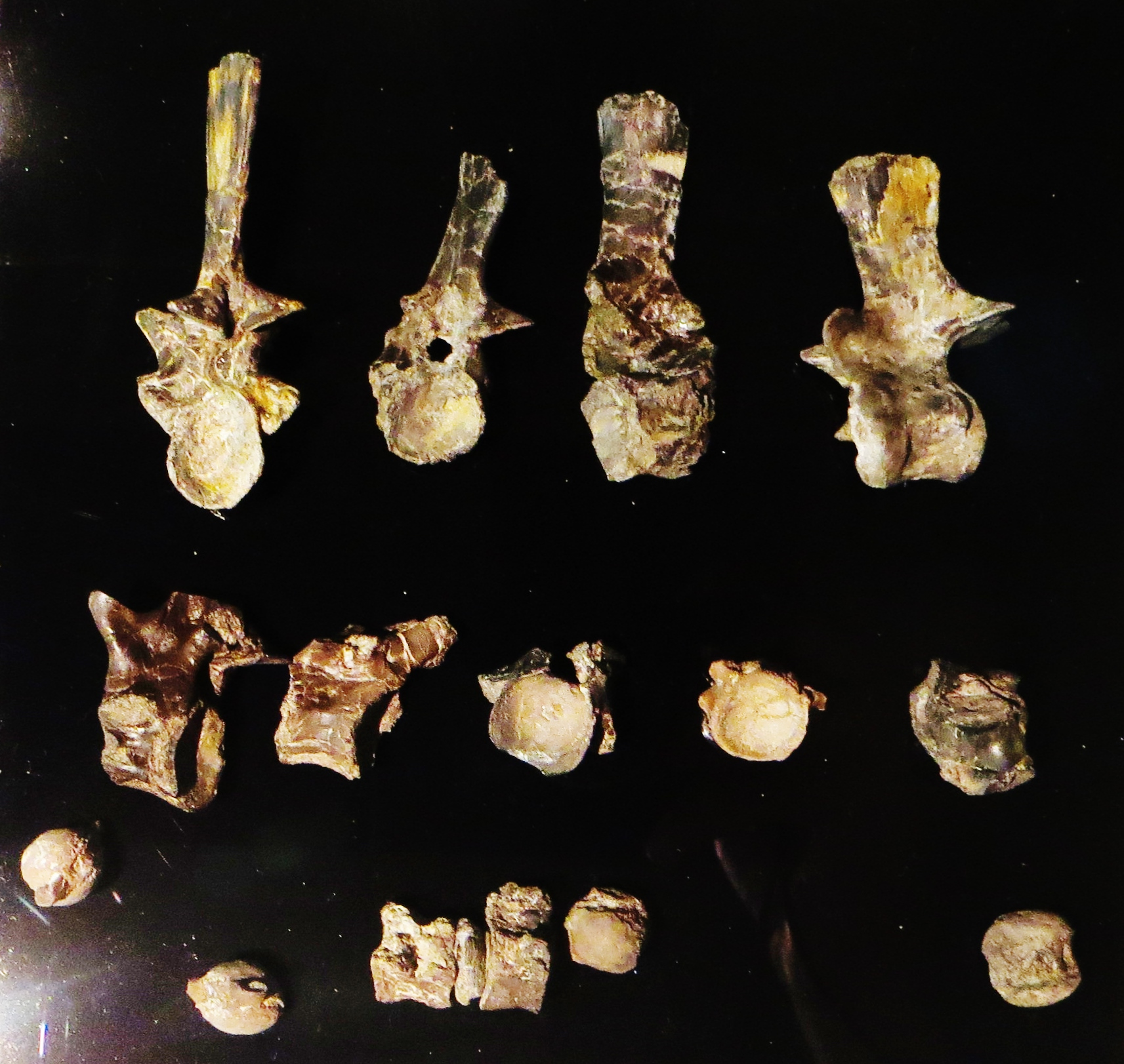 Took the picture at Muschelkalkmuseum Ingelfingen